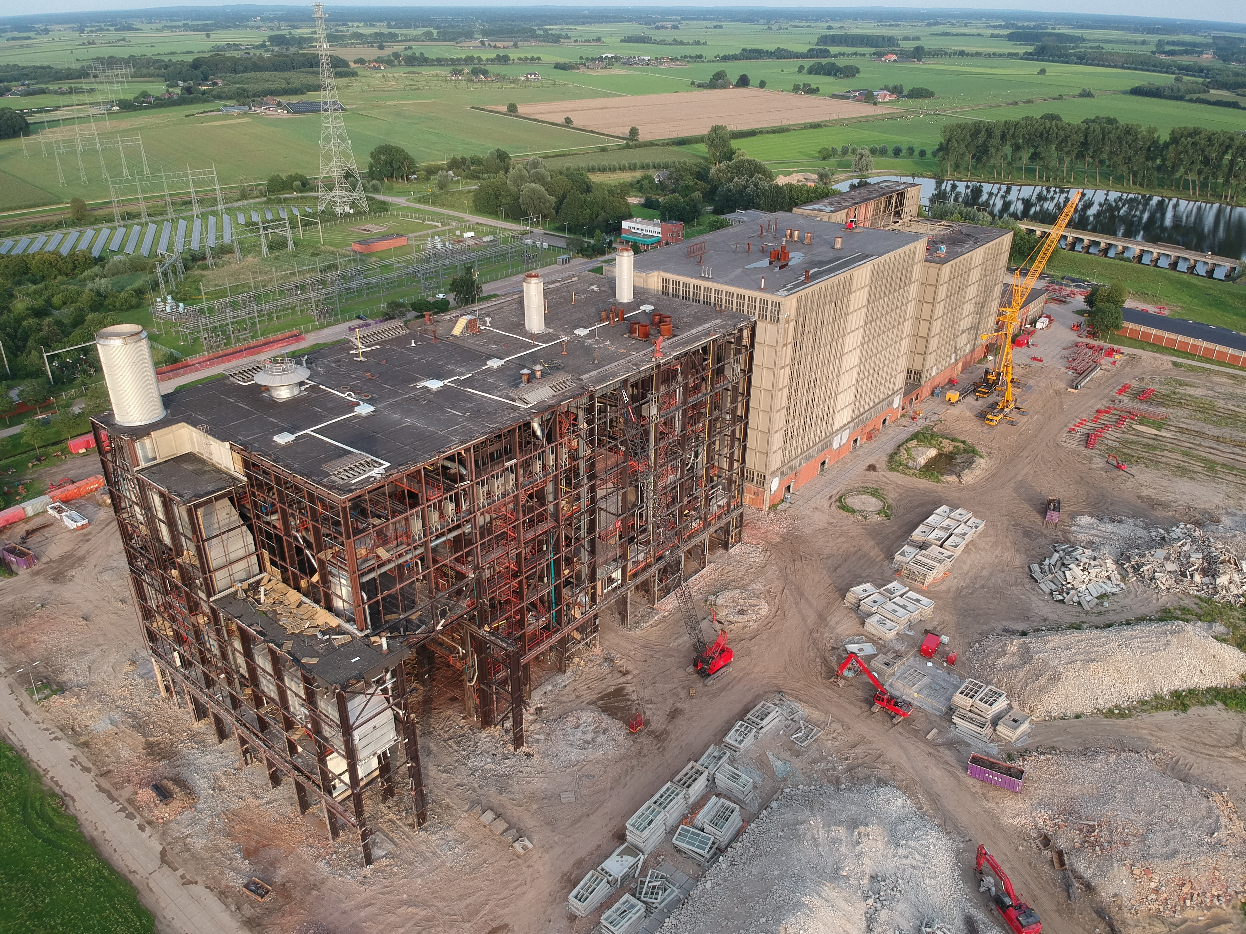 IJsselcentrale sloop. Vanuit de lucht geschoten zicht op de ontmanteling van de voormalige energiecentrale. 7 augustus 2017